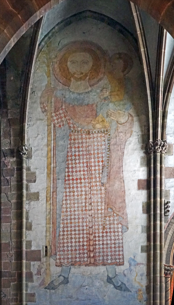 Saint Christophe tenant l'enfant Jésus dans ses bras Fresque monumentale de 11 m de haut sur les murs de l'église fresque du XVème siècle Église Saint-Pierre-et-Saint-Paul à Wissembourg Plus vaste église gothique d'Alsace après la cathédrale de Strasbourg, l'église a été construite de 1265 à 1284 à l'emplacement d'un premier édifice du début du 11e siècle dont il reste le clocher. Construction achevée au 14e siècle. La flèche de la tour de croisée a été reconstruite en 1882 après un incendie. Des décors datant de la construction ont dû être recouverts en 1545. Après la Révolution, réfection et surélévation du niveau du sol (80 cm) , destruction du jubé, nouveau blanchiment des intérieurs. De 1822 à 1828, réaménagement du choeur et mise en place de nouvelles stalles et d'autels néogothiques. En 1860, dégagement des peintures murales des 14e et 15e siècles dans le transept et les chapelles. En 1875, les chapelles reçoivent un décor peint néogothique. En 1967, les peintures des 14e et 15e siècles sont dégagées dans le croisillon sud (apôtres, vie et passion du Christ, Saint-Christophe). Extrait de la base Mérimée du ministère de la culture